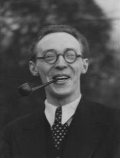 El Maestro 2